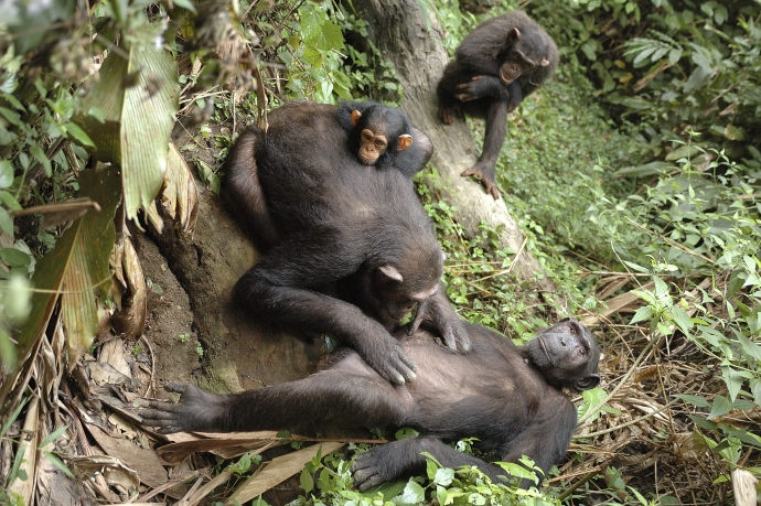 L'épouillage est consciencieux et mutuel, il renforce les liens de la communauté.